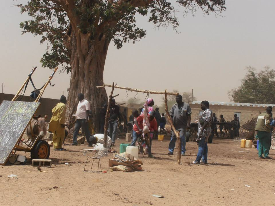 Village sérère du Sénégal